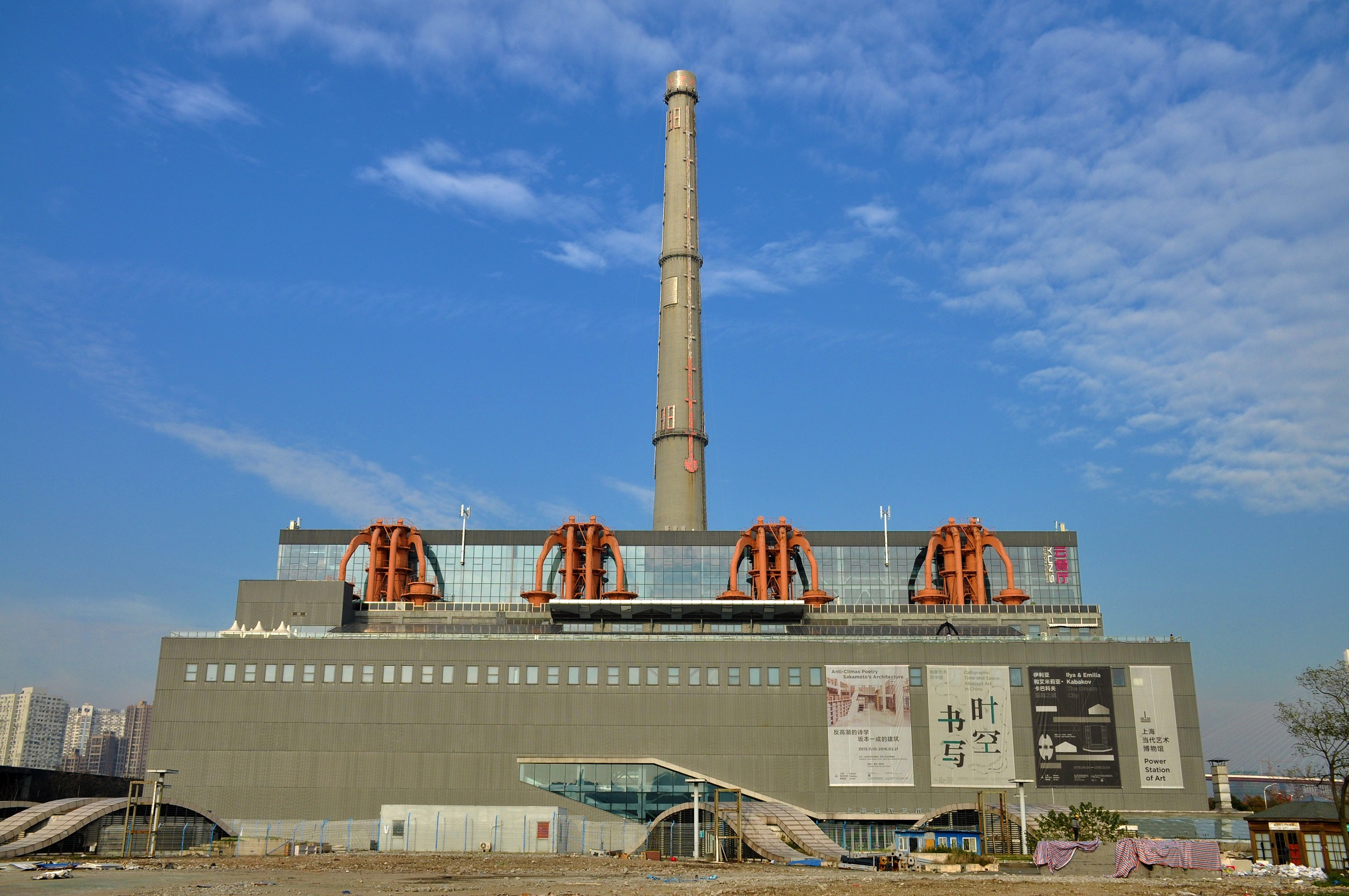 中文（中国大陆）: 南市发电厂 花园港路200号